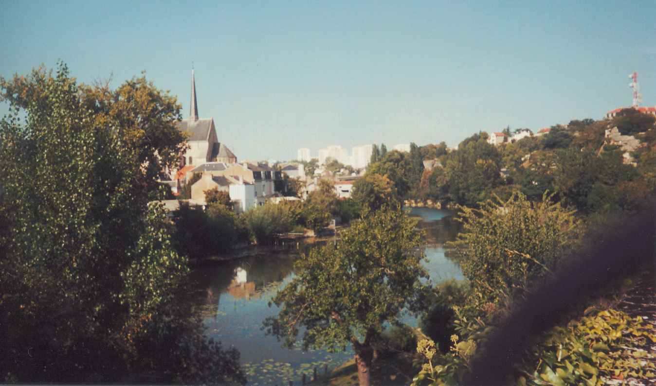 Date : fr:9 septembre 2004, vers 16 h 00 Source : photo personnelle d'archeos Description : le Clain à Poitiers, vu de la rive droite, au Pont-Neuf, vers le Nord. Bâtiments visibles de gauche à droite : Église Sainte-Radegonde dont on voit le chevet et la flèche, HLM du quartier des Couronneries, ainsi qu'un pylône de télécommunications Licence